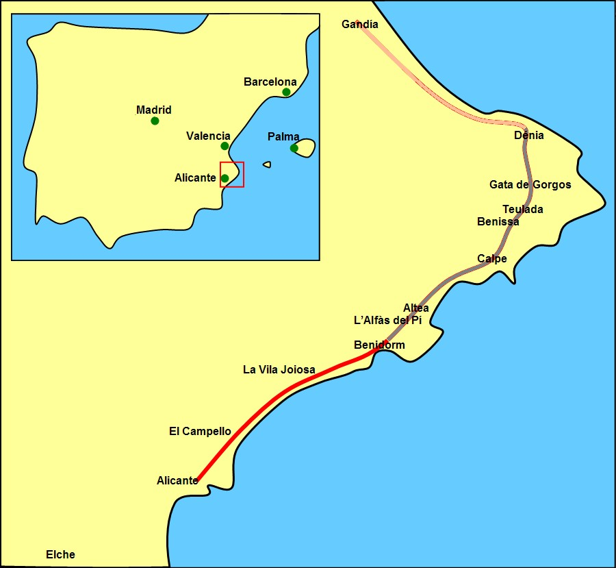 Die Karte stellt schematisch den Verlauf der Linien L1 (rot) und L9 (grau) der Stadtbahn Alicante dar sowie den stillgelegten Abschnitt (rosa), der reaktiviert werden soll.